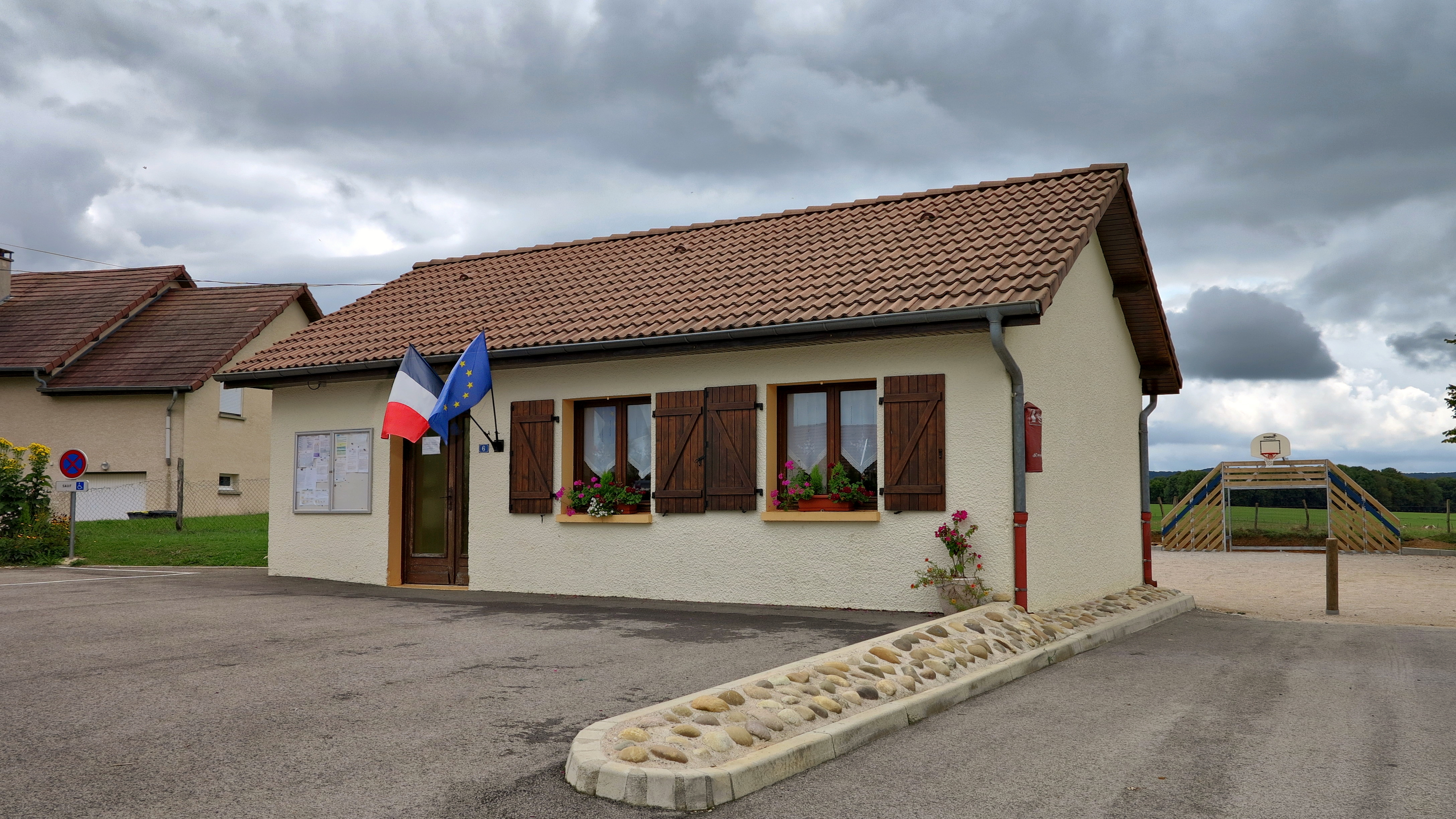 La mairie